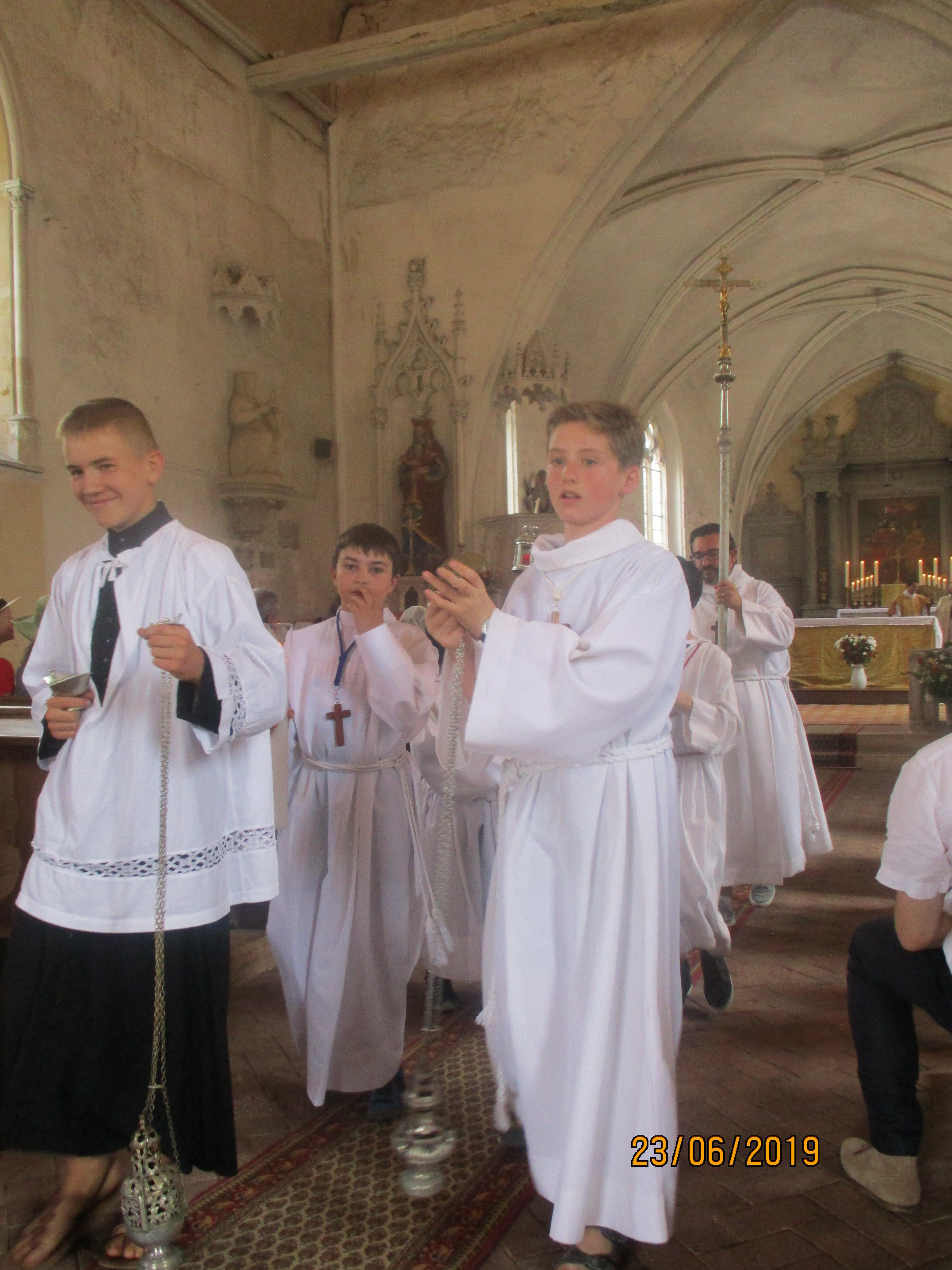 Fête-Dieu à Véron (archidiocèse de Sens-Auxerre), le 23 juin 2019. Thuriféraires.